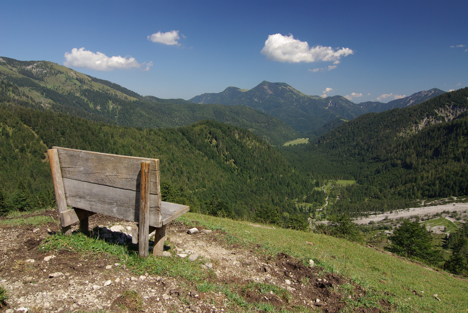 Von der Sitzbank an der Kreuzbergalm auf 1300 m Höhe überblickt man das Kloaschertal bei Bayrischzell, Bayern, Deutschland. Im Hintergrund der Große Traithen.